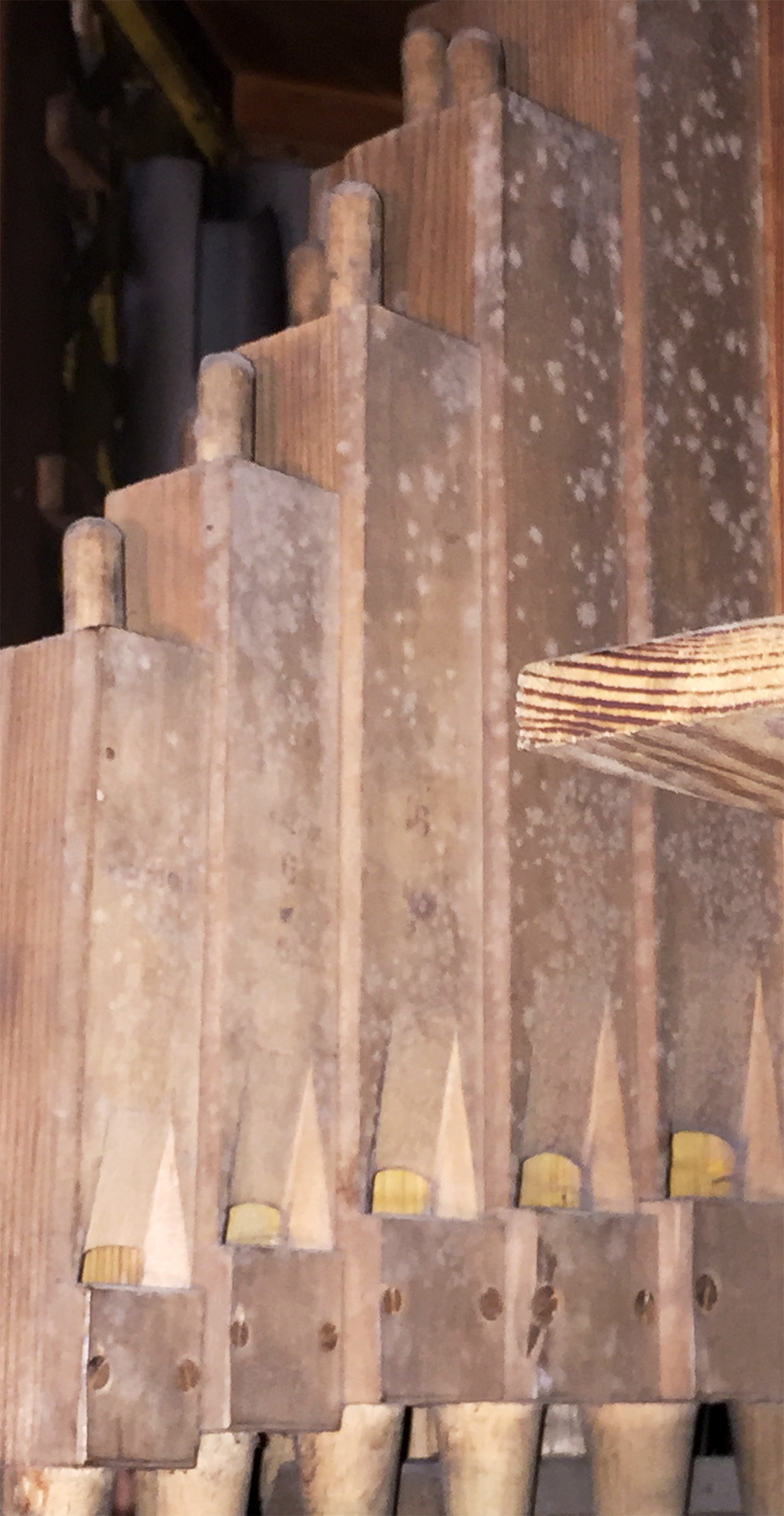 Schimmelpilzbefall des Pfeifenwerks der Strebel-Orgel in St. Michael zu Stadtsteinach am Beispiel einiger Pfeifen des Registers Bordoun 16' auf der oberen Windlade. Das Foto dokumentiert den Zustand 2017.